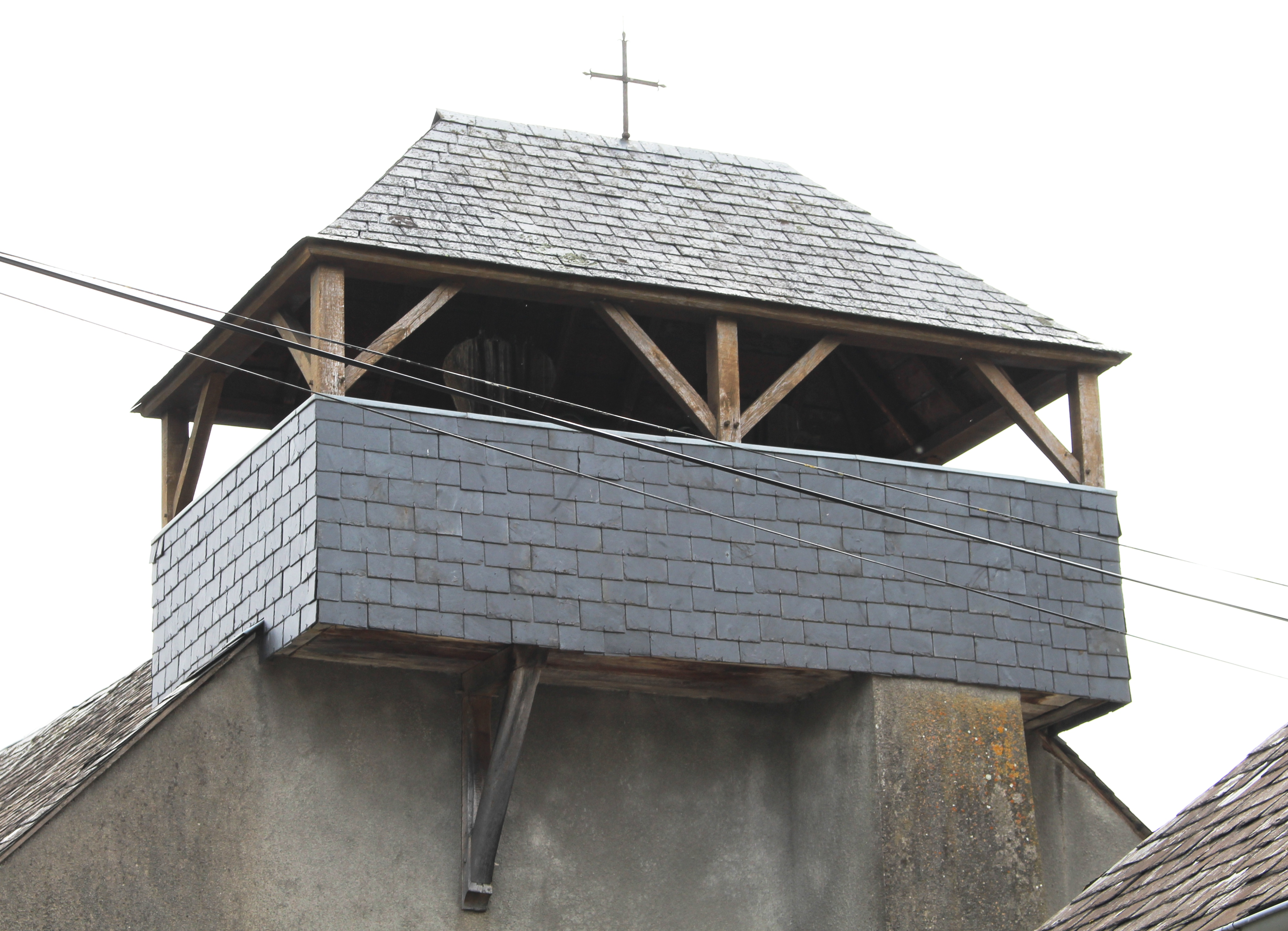 Église Saint-Blaise d'Arrodets (Hautes-Pyrénées)